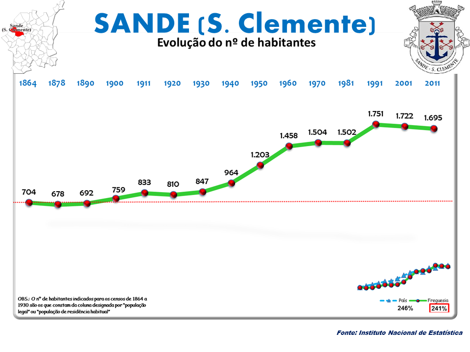 Censo 2011